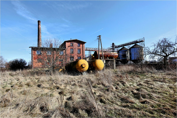 Nieużywana od wielu lat gorzelnia w Dobieszczyznie